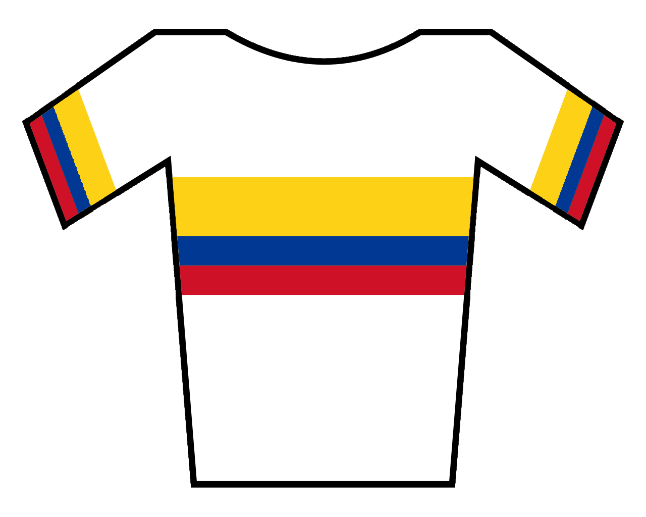 Maillot de Colombia